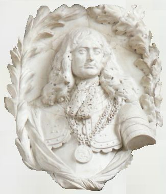 Detail van het praalgraf van Jan van Brakel (Jan van Brakel (c 1638–1690). Buste met erepenning van de Staten-Generaal